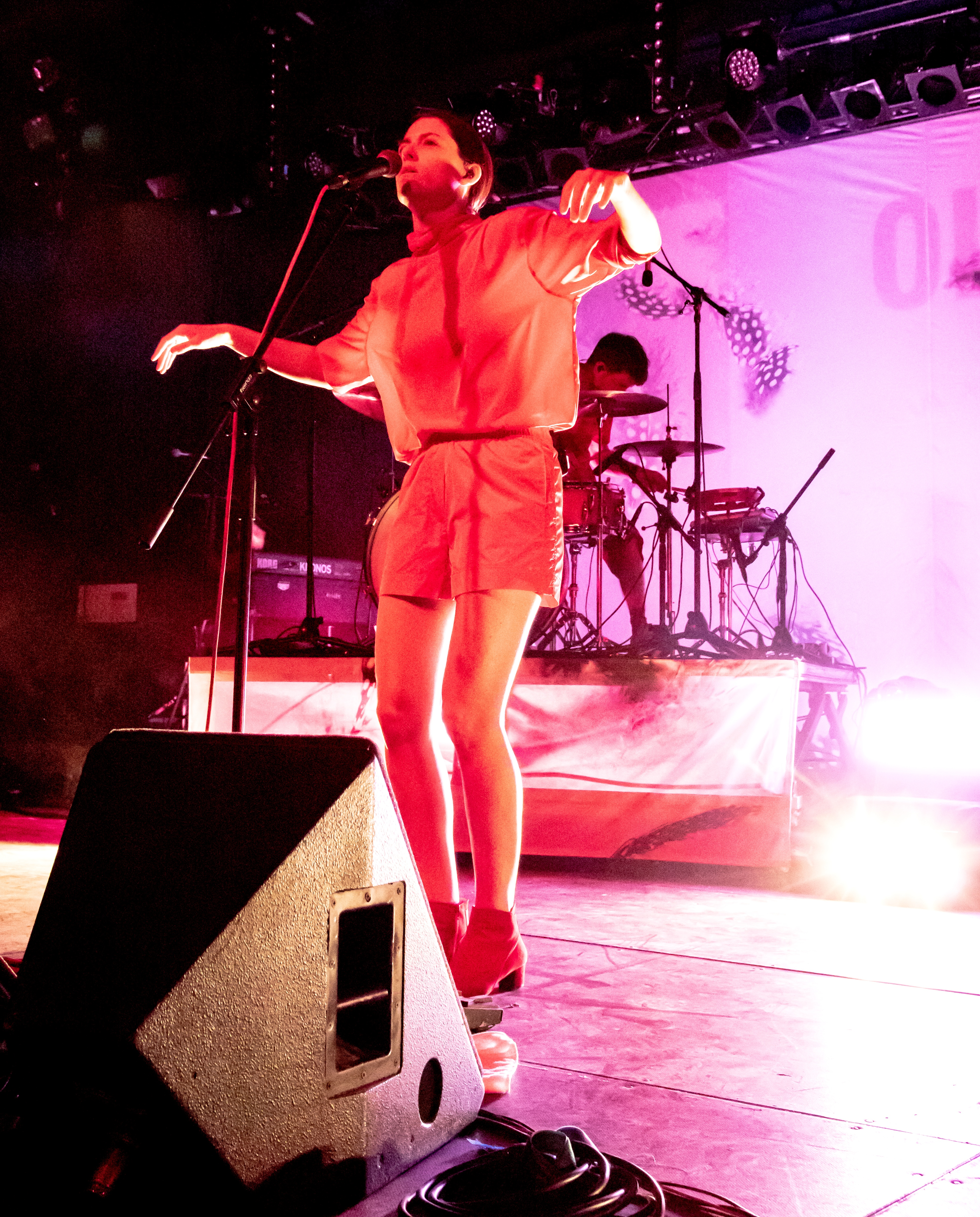 Bilder vom Zelt Musik Festival 2018 in Freiburg im Breisgau Auftritt Kat Frankie am 19. Juli 2018 im Zirkuszelt als Support Akt bei de::Olli Schulz